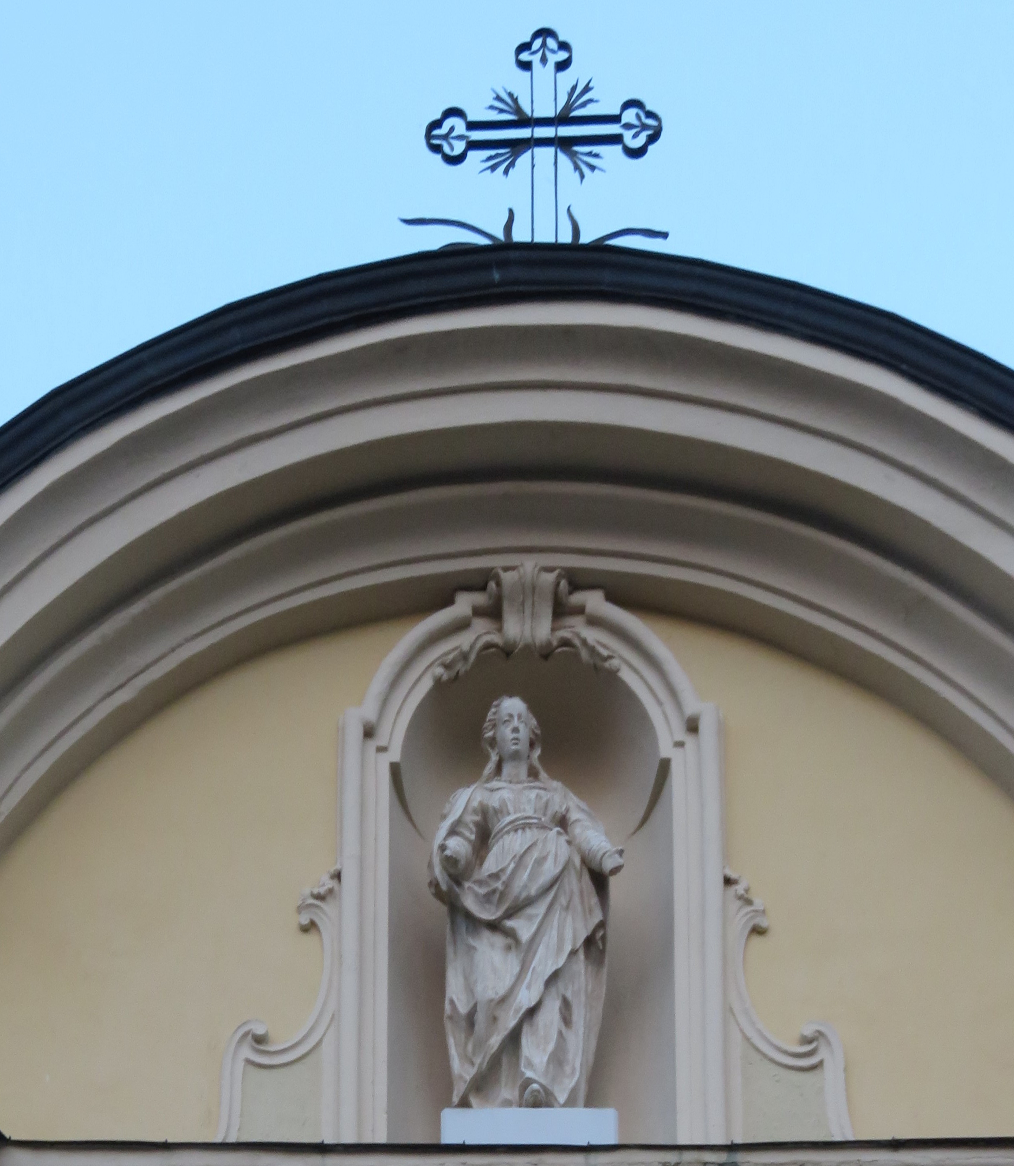 Copia della statua lignea di Raphael Barat in una delle nicchie sulla facciata della chiesa